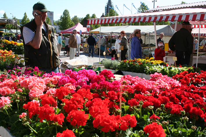 Forssa Market place at summer 2006